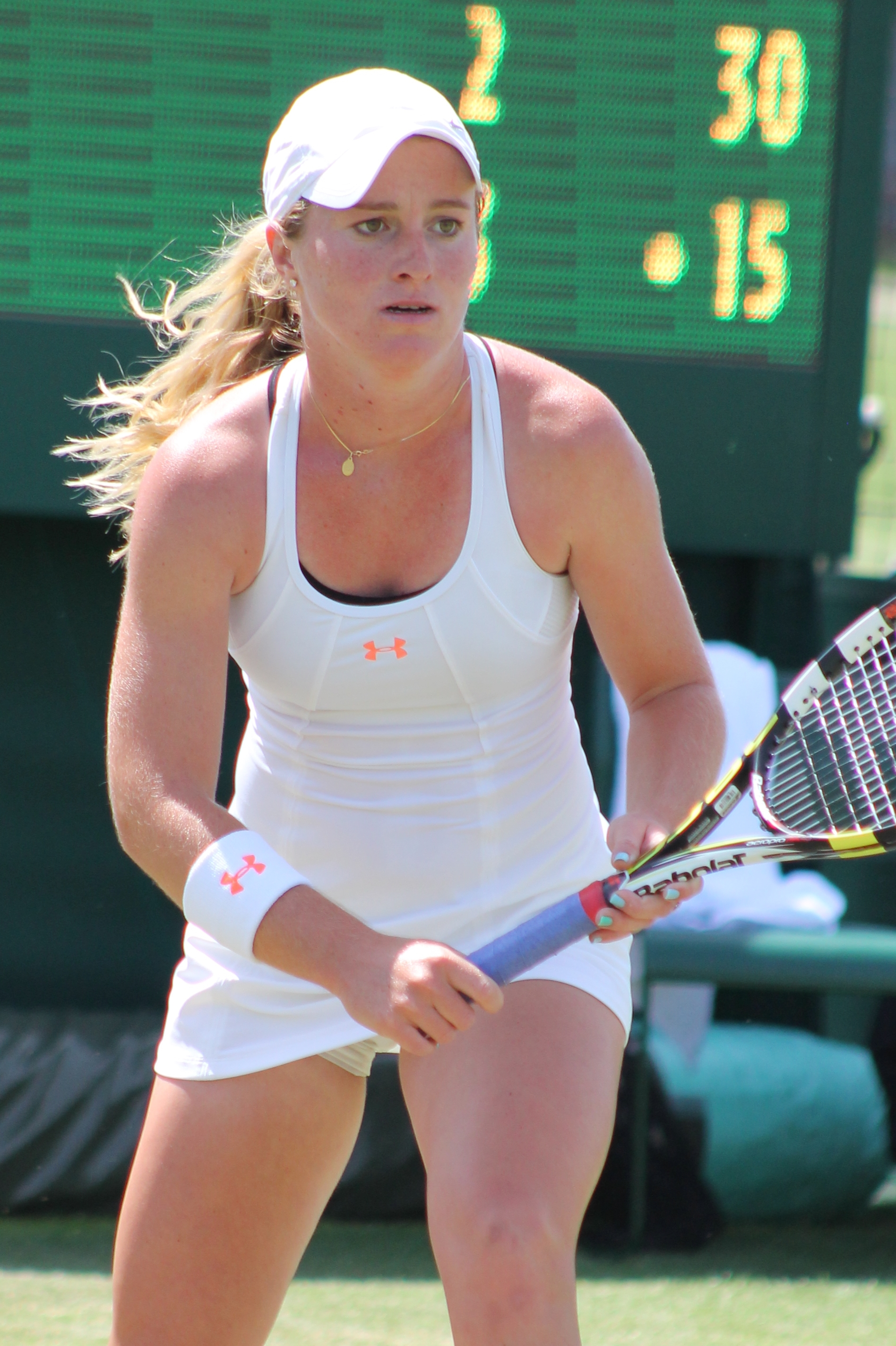 Kiick WMQ14 (5)